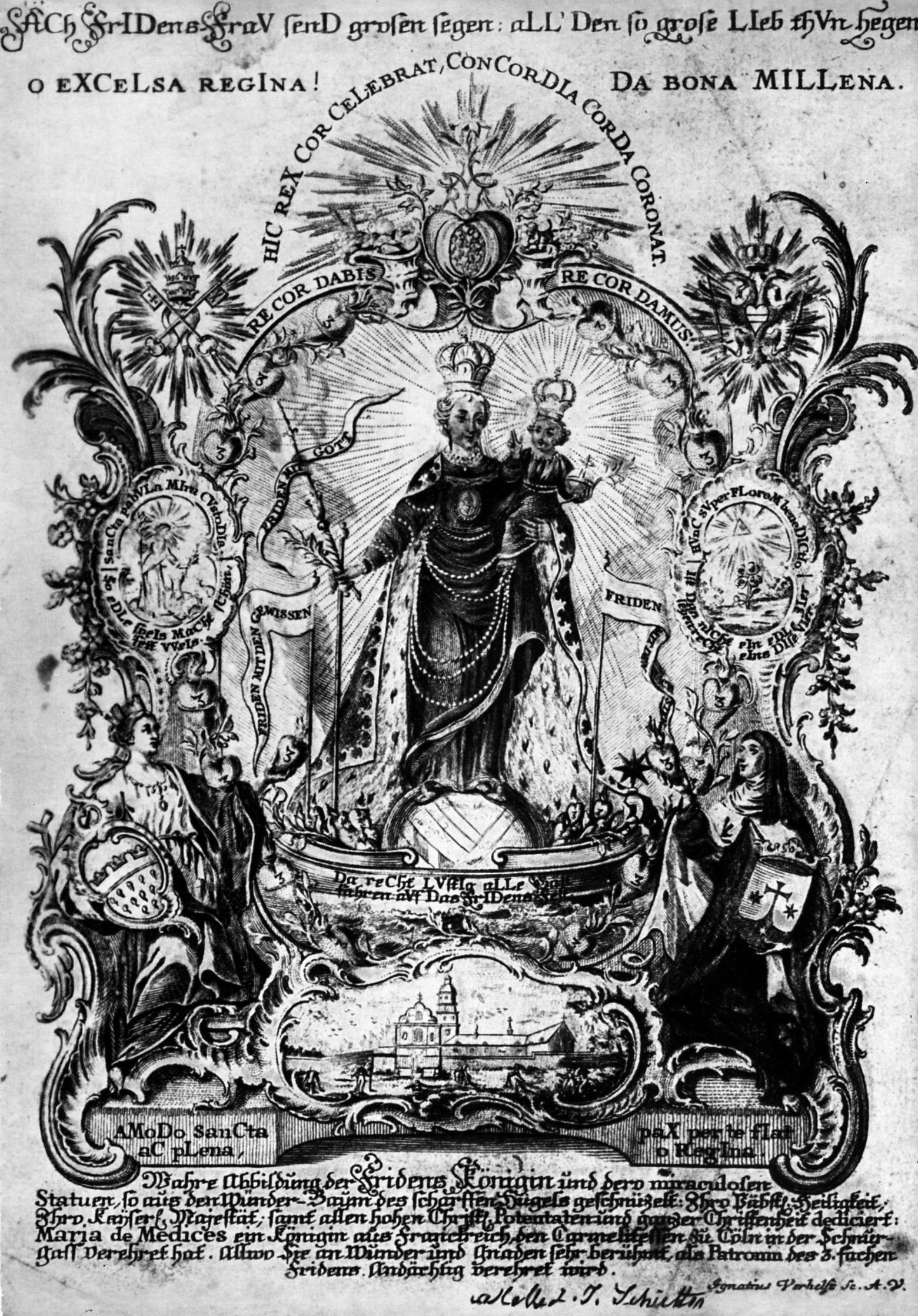 Gnadenbild "Regina Pacis". Zeitgenössische Darstellung